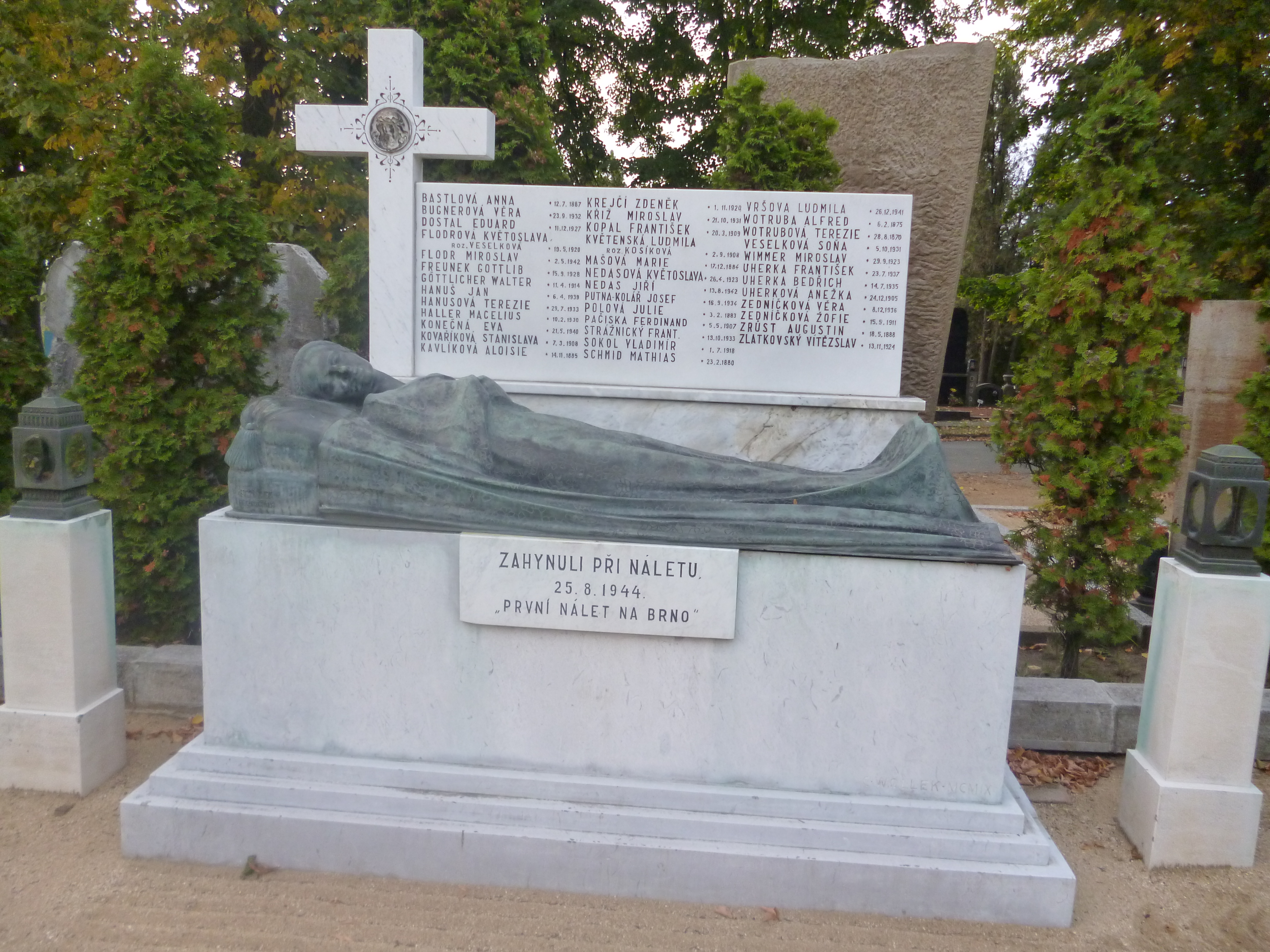 Brno-Židenice, hrob obětí náletu z 25. 8. 1944, vpravo od vchodu ve skupině čestných hrobů, autor plastiky C. Wollek